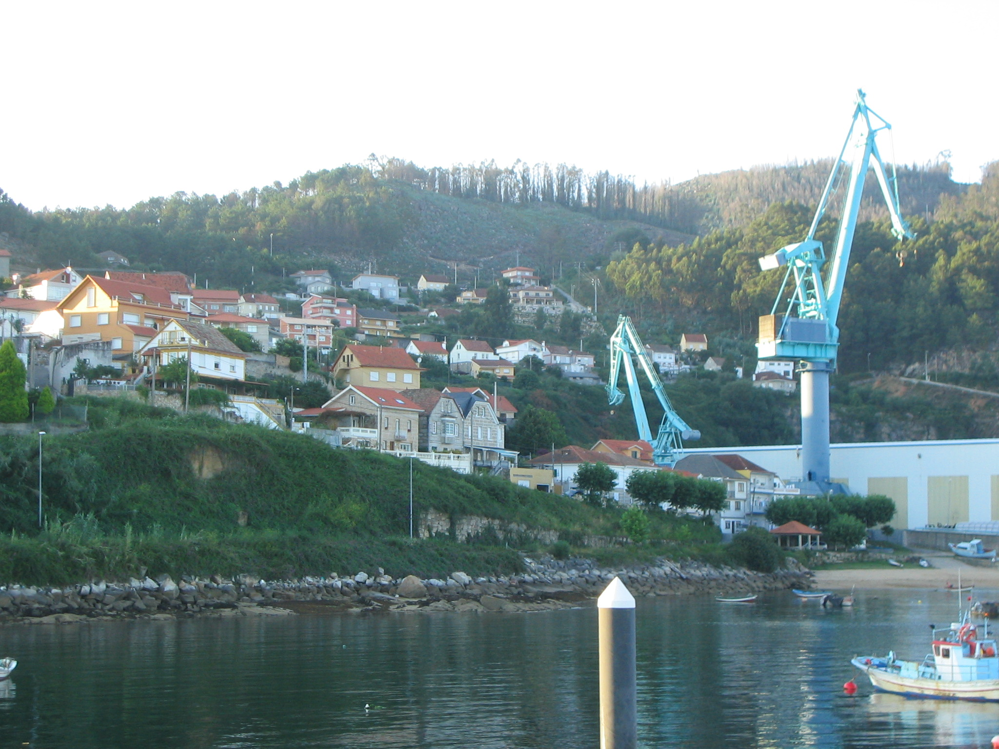 Vista del barrio de Isamil de Meira en Moaña, Pontevedra, Galicia (España).